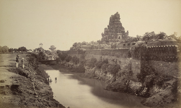 தஞ்சை பெரிய கோவில் பழைய தோற்றம்